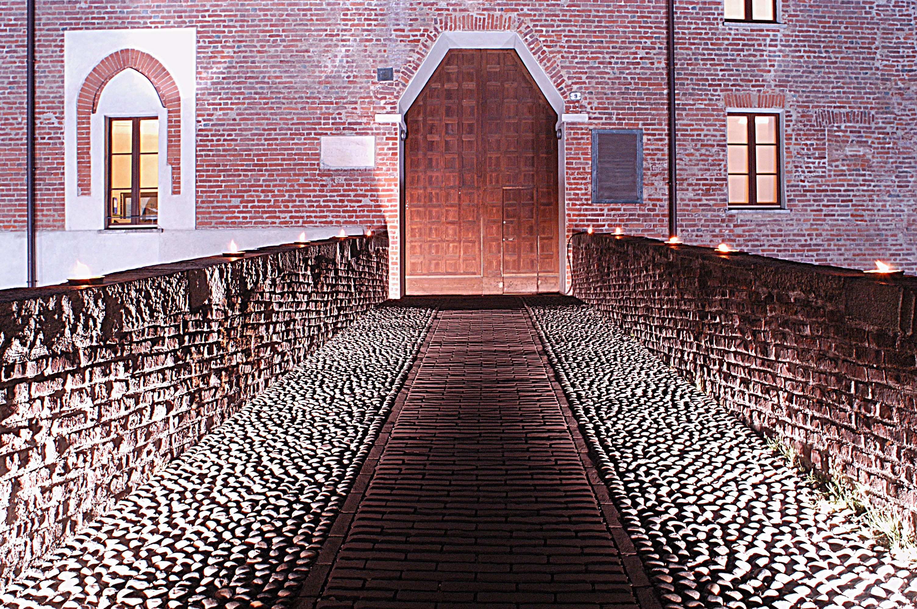 Castello Abbiategrasso This is a photo of a monument which is part of cultural heritage of Italy.